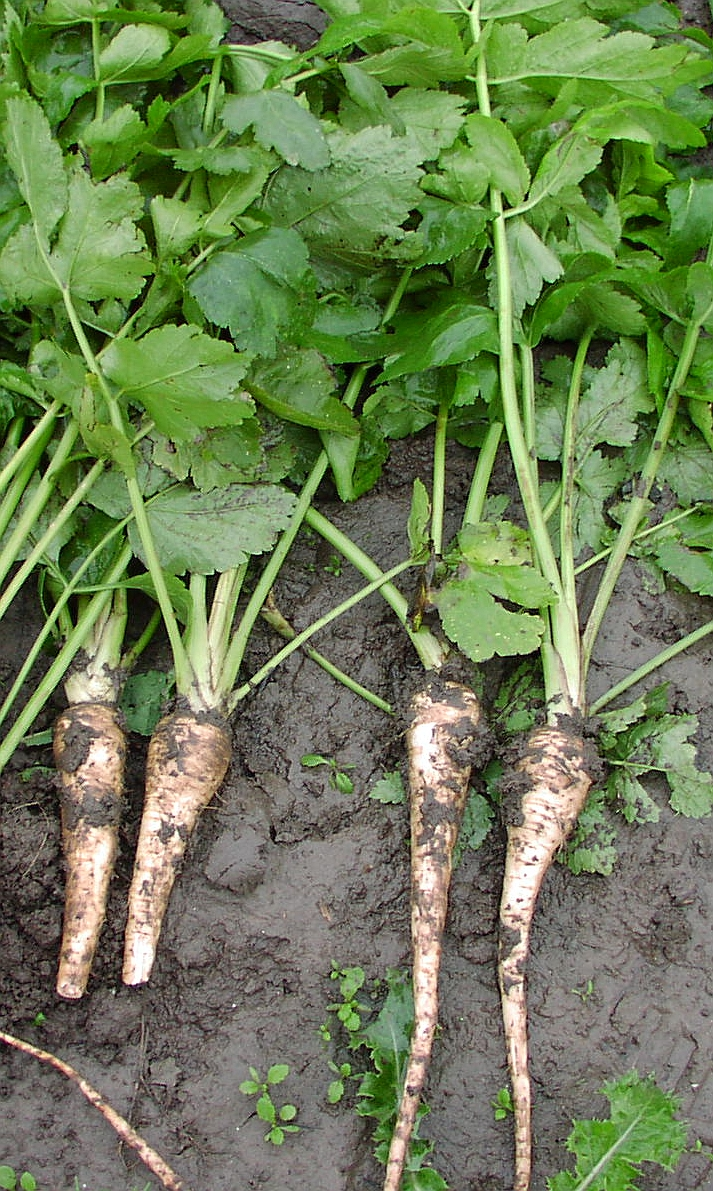 geerntete Pastinaken-Pflanze